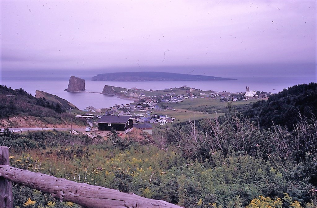 Diapositive couleur illustrant la ville de Percé dans la région administrative Gaspésie-Îles-de-la-Madeleine.